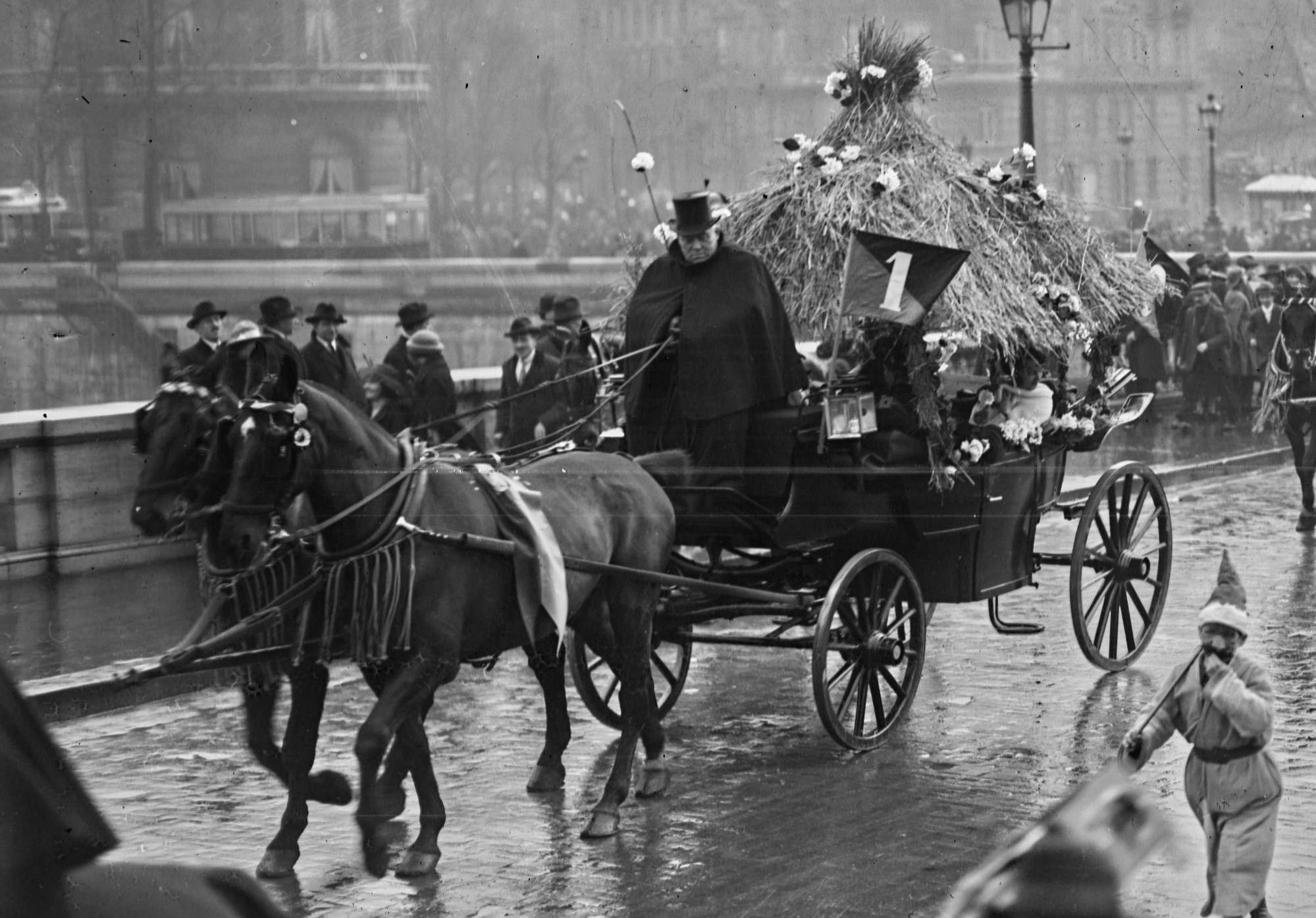 Le jeudi de la Mi-Carême 8 mars 1923 le char de la Reine des Abeilles 1923 Geneviève Durand passe sur le pont de la Concorde.